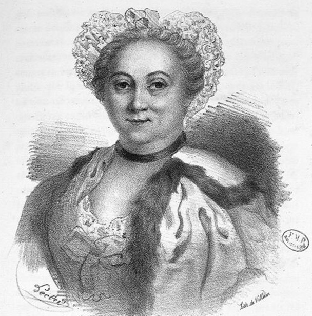 Mme du Coudray